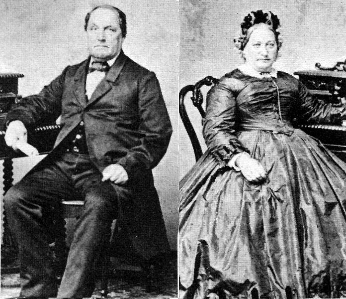 Abraham and Helen Einstein, grandfather and grandmother of Albert Einstein